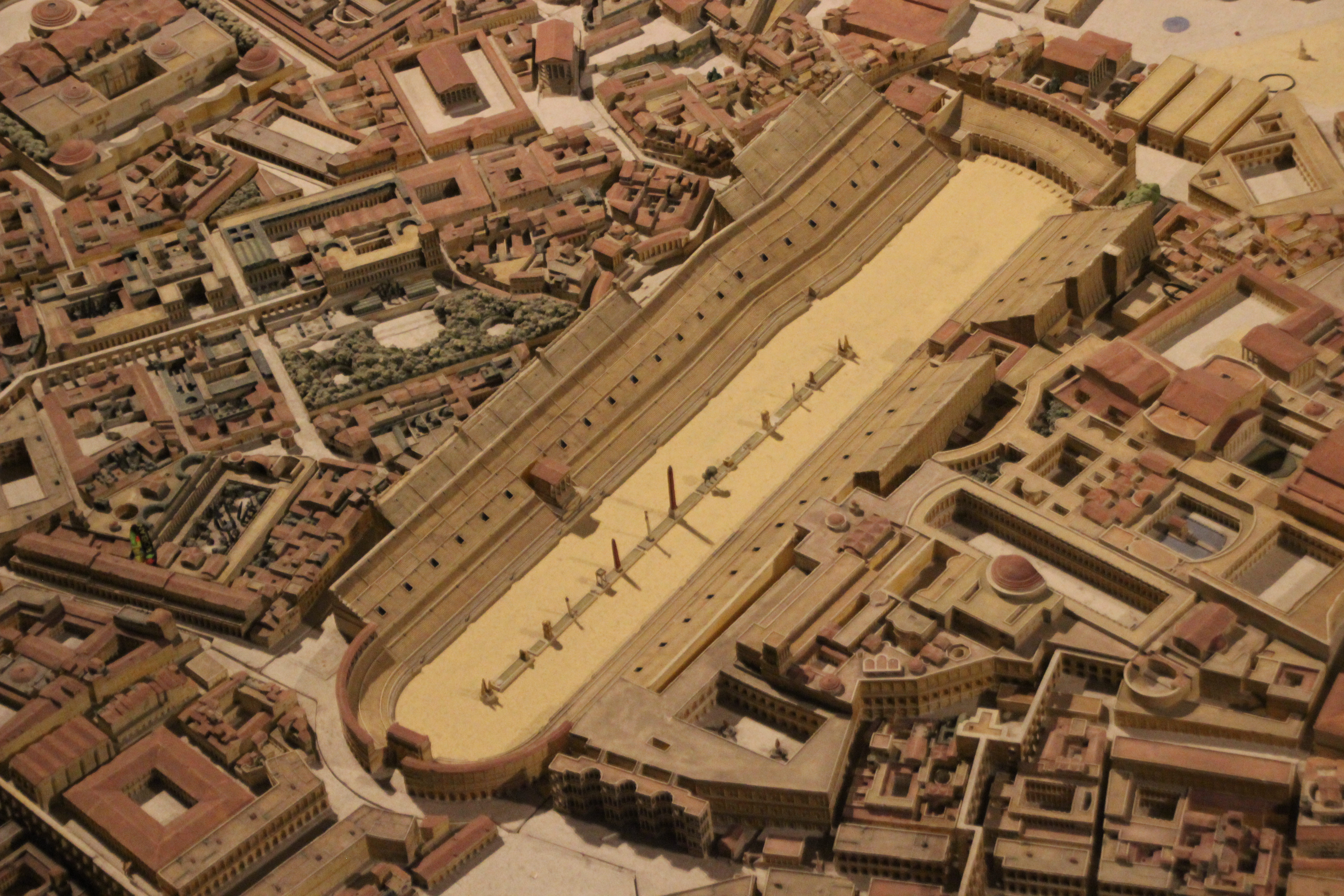 Plan de Rome du Cinquantenaire à Bruxelles - Circus Maximus